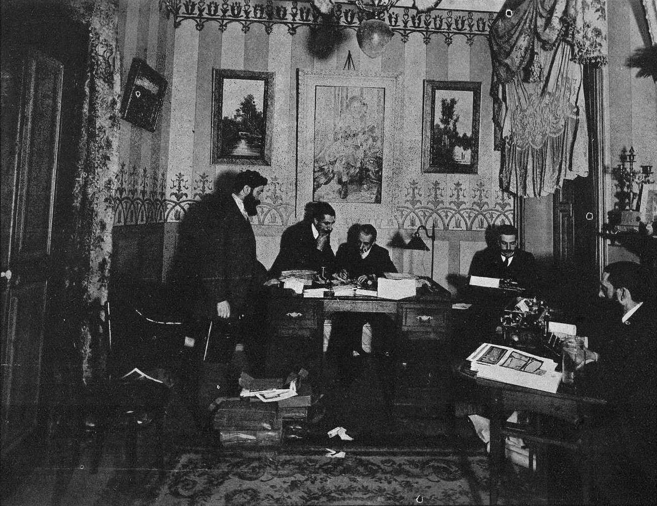 Redacción de Vida Gallega en 1909. De esquerda a dereita:José Gil Gil (redactor fotográfico), Juan Tato Lens (redactor secretario), Jaime Solá (director), Julián García Larrú (redactor) e Julián Iglesias (administrador).